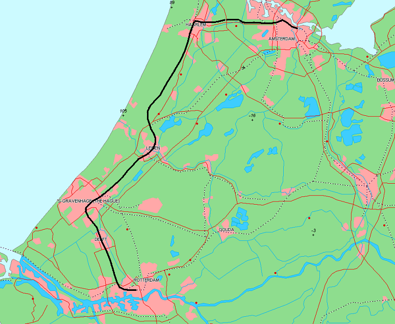 Description kaart van het tracé van de Kamperlijntje DateSourceGebaseerd op kaart van (vrije software gebaseerd op vrije database)Authorbewerkt door Gebruiker:MauritsvinkPermission (Reusing this file) PD kaart van het tracé van de Kamperlijntje